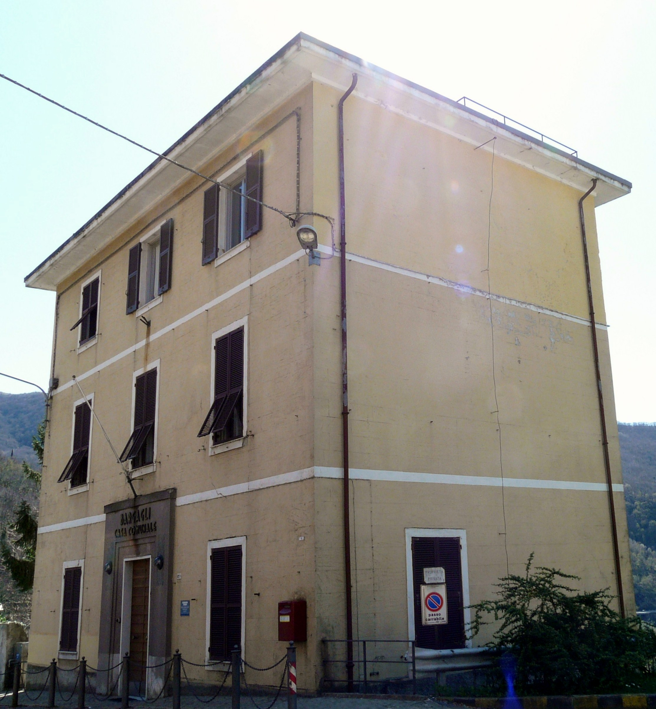 Municipio di Bargagli, Liguria, Italia